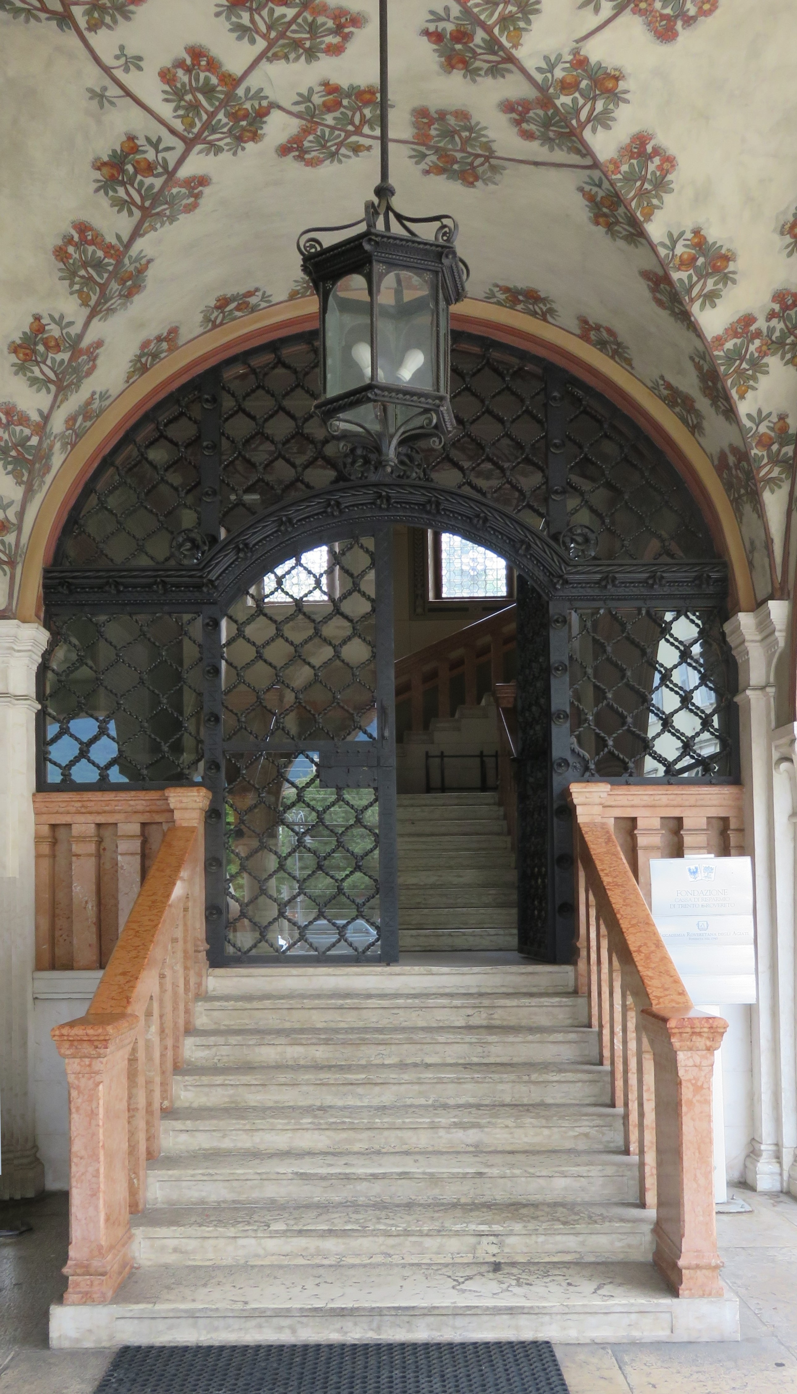 Fondazione Caritro Rovereto - Accademia Roveretana degli Agiati